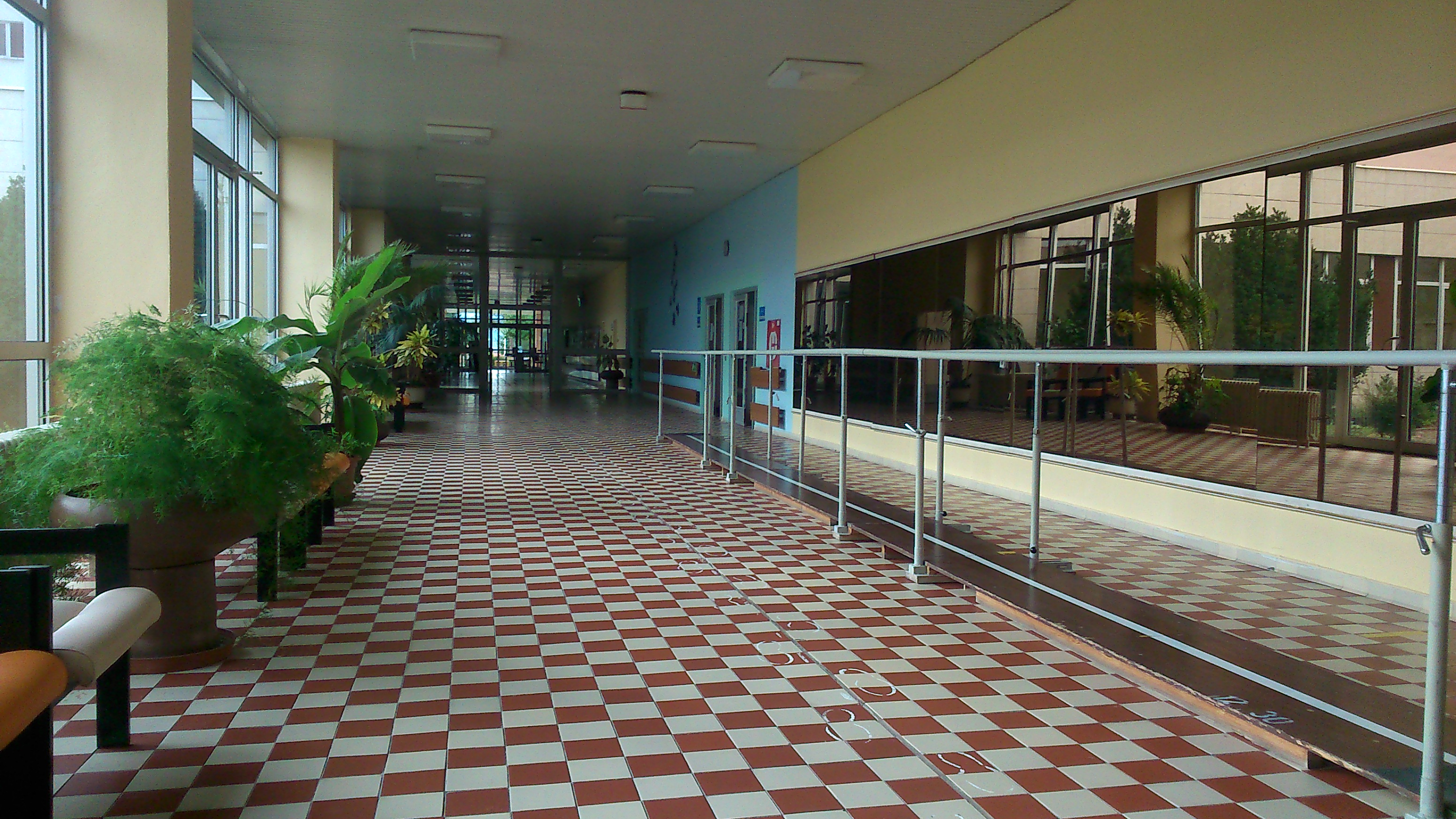 Hlavná chodba rehabilitačného komplexu